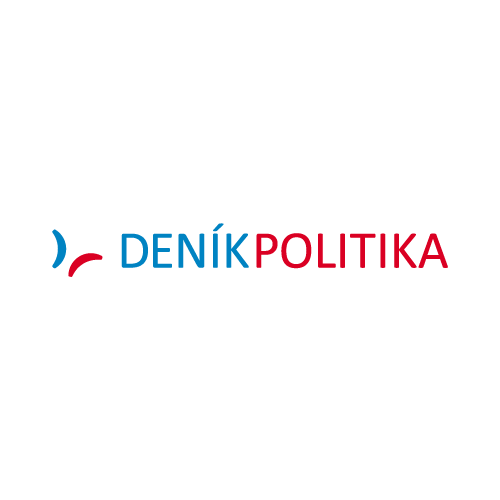 Logo internetoveho projektu Denikpolitika.cz